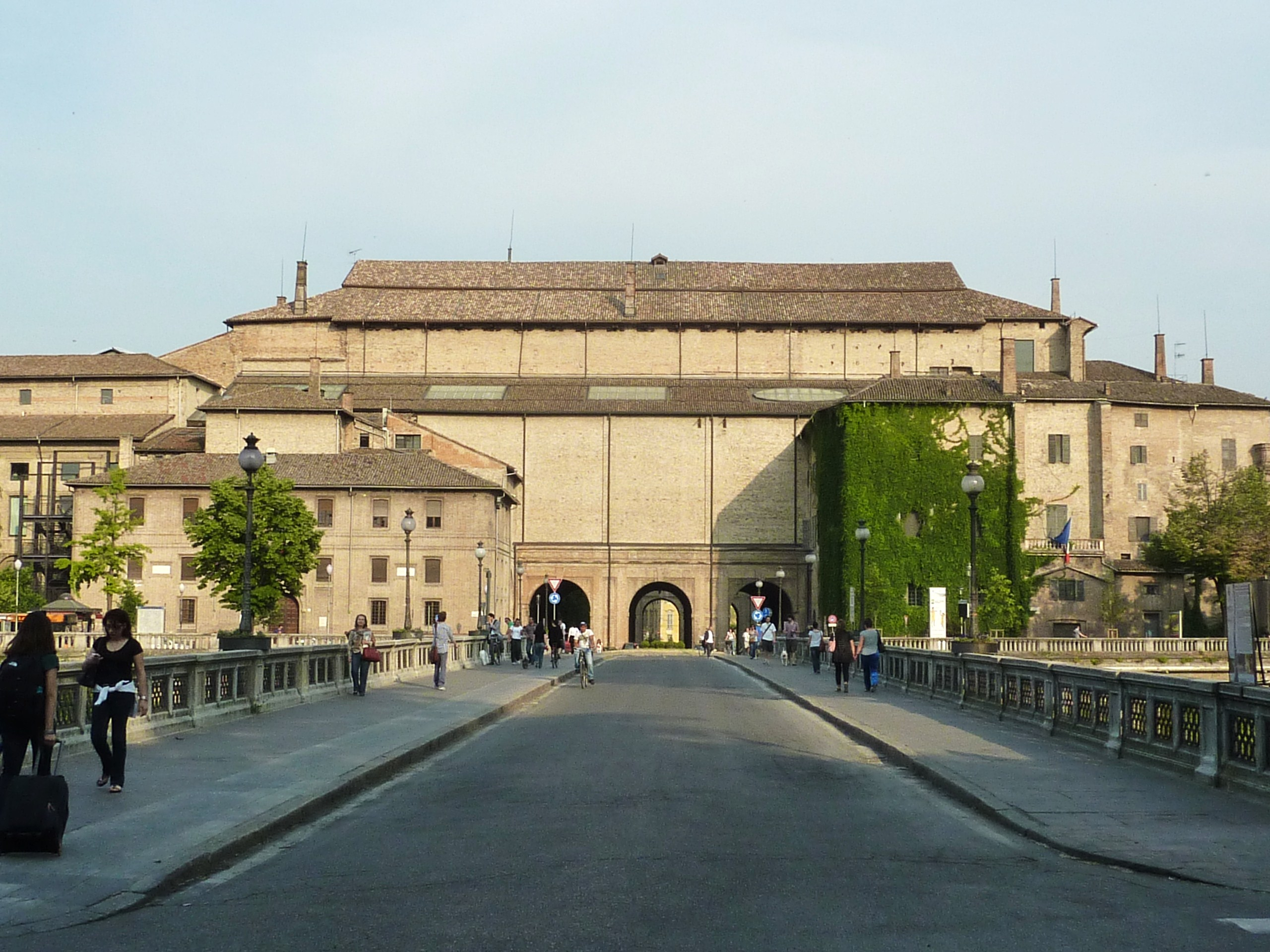 Il palazzo della Pilotta (Parma) visto dall'ingresso del Parco Ducale.